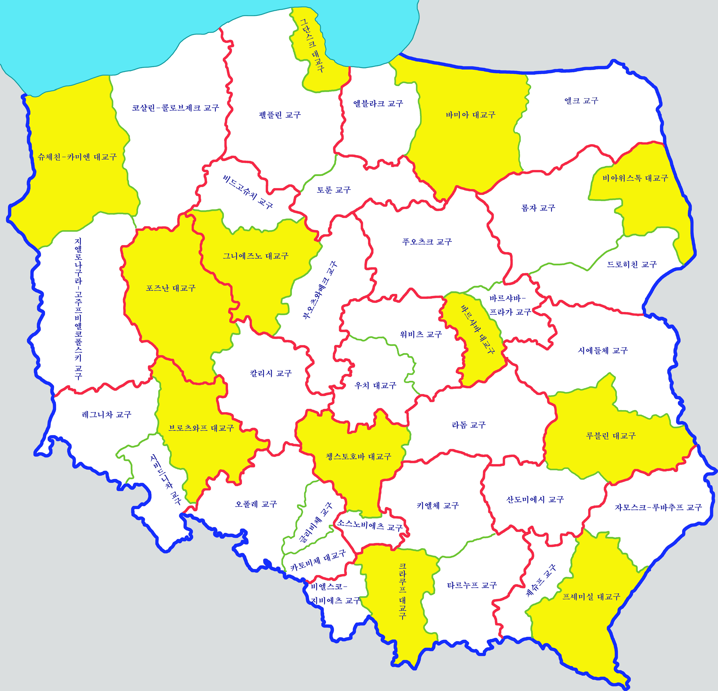 폴란드 로마가톨릭교구도